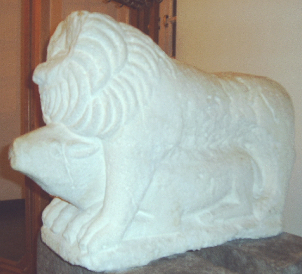 Das „steinerne Wölfchen“ – Bonner Wappentier in the old city hall of Bonn.